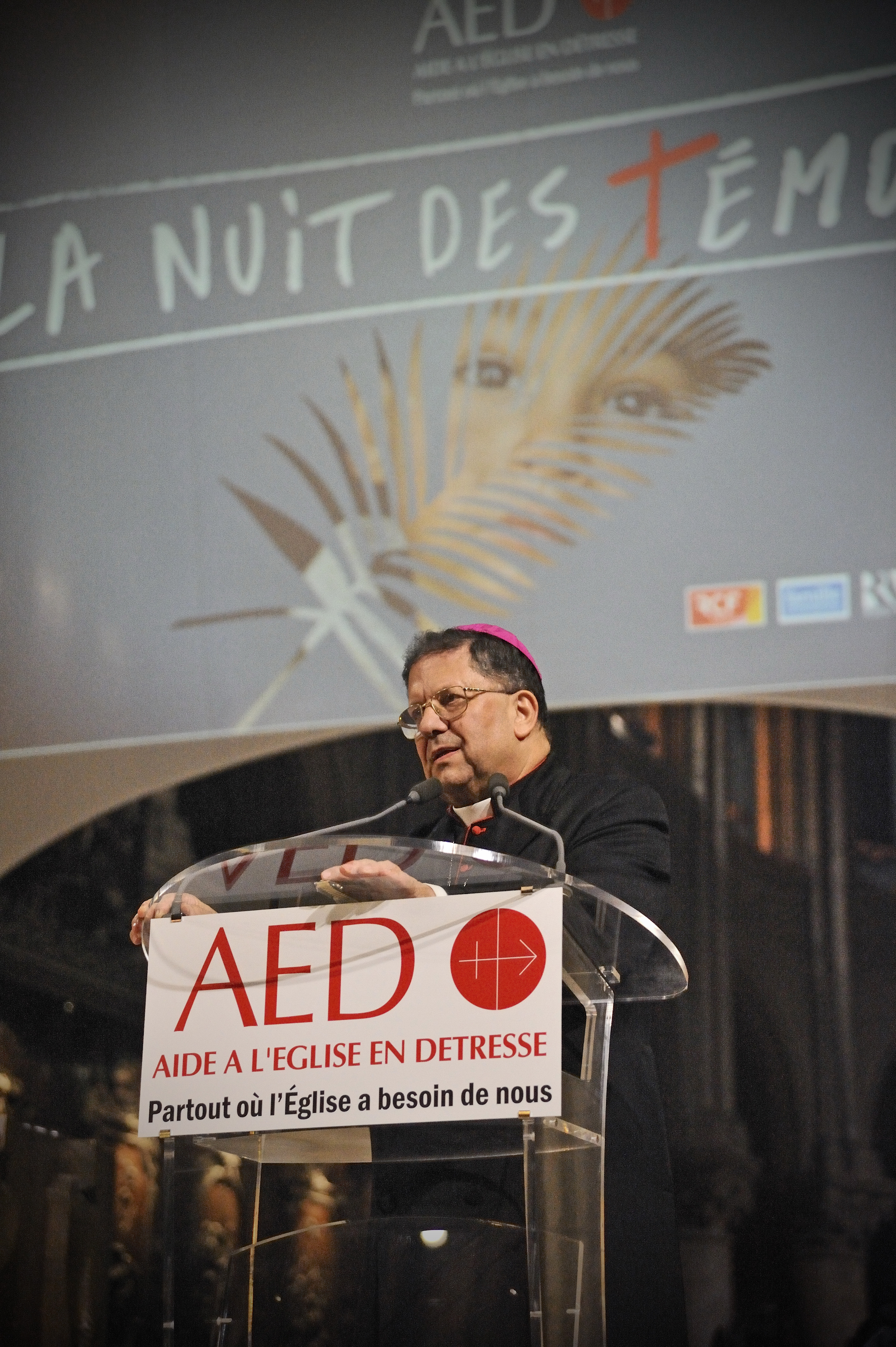 Mgr Sleiman à la Cathédrale Notre-Dame de Paris en 2015, à la Nuit des Témoins 2015. copyright MA Mouterde